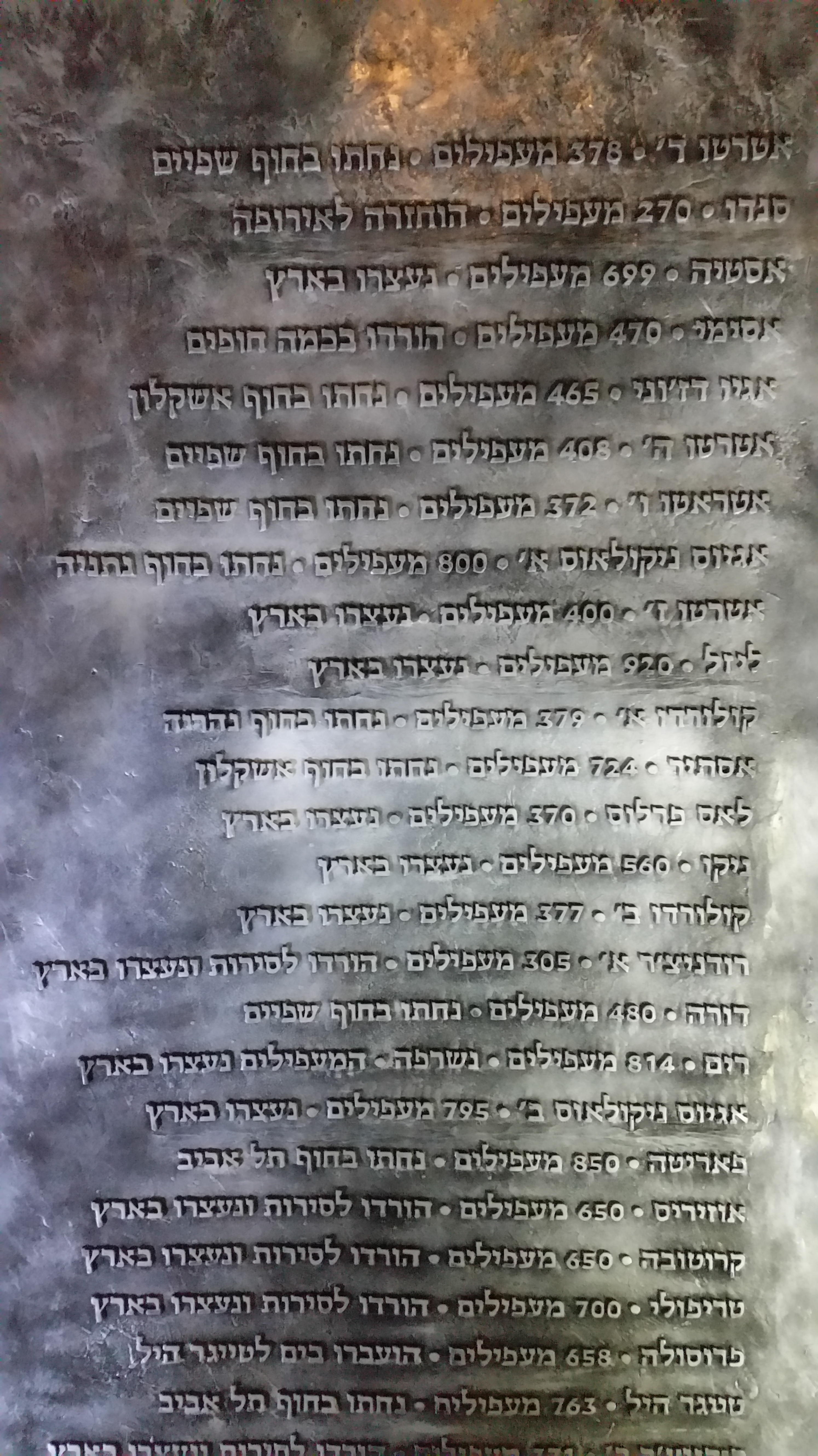 אחד מששת הלוחות באנדרטת ההעפלה בכיכר לונדון, תל אביב